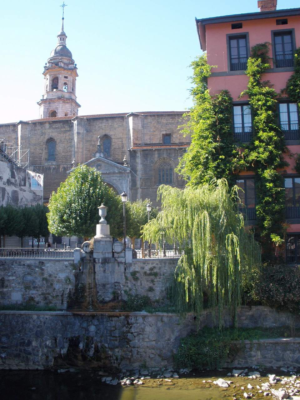 Azkoitia (Gipuzkoa) - Iglesia de Santa Maria la Real